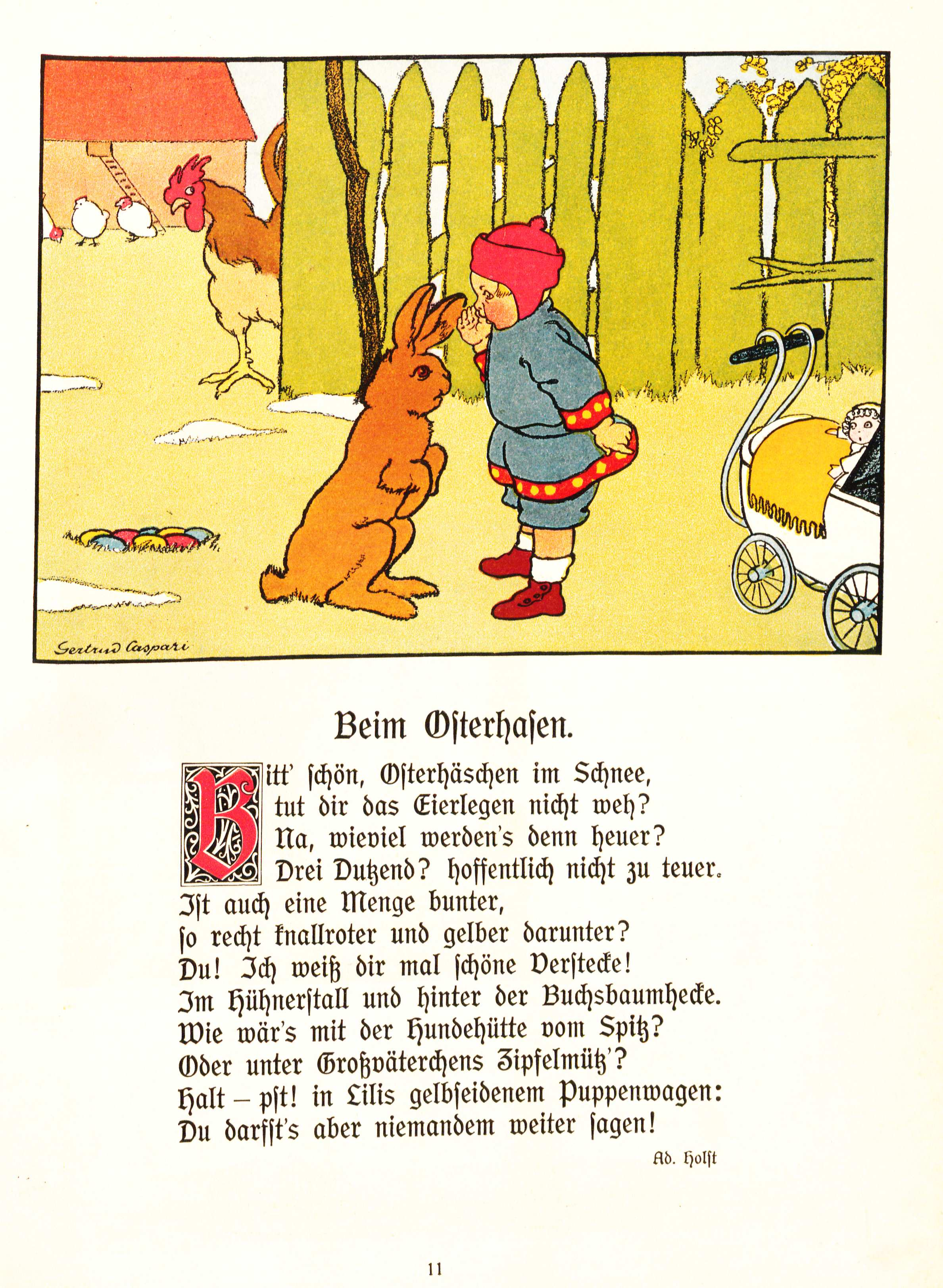 Gertrud Caspari Kinderhumor Osterhase Gedicht von Adolf Holst